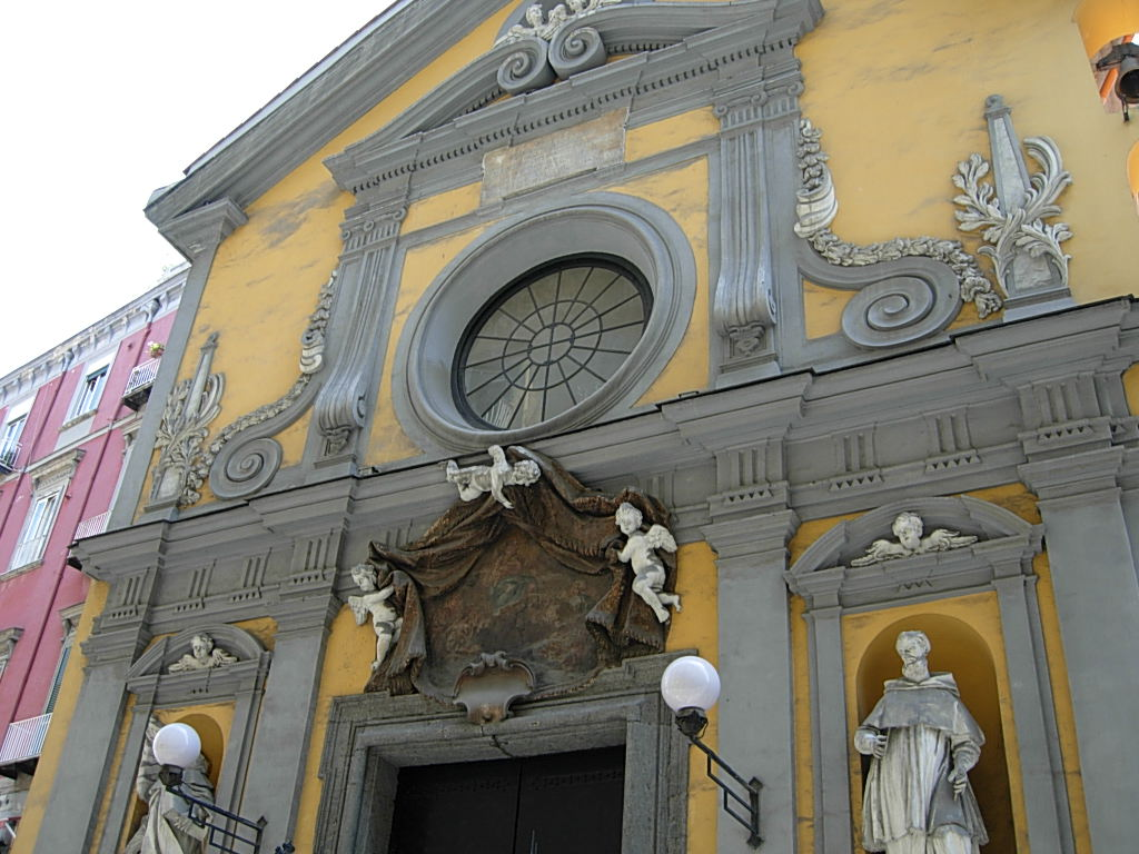 Chiesa di Santa Maria della Mercede e Sant'Alfonso Maria de' Liguori in Napoli Foto personale concessa in PD